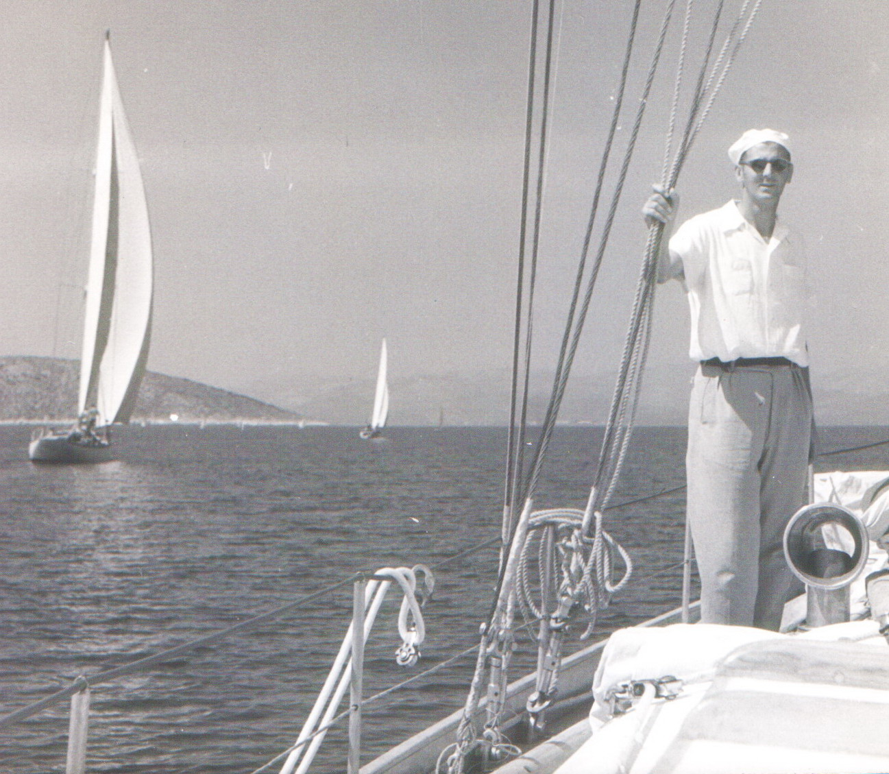 Antun Mitrović na palubi Podgorke u Bračkom kanalu